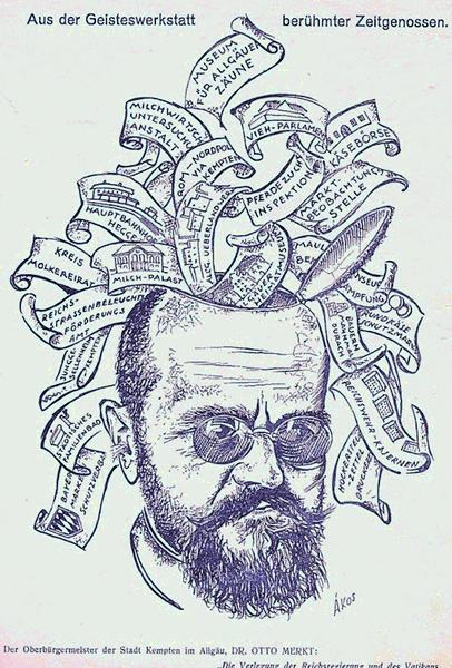 Der Kemptener Architekt und Künstler Andor Akos zeigte in dieser Zeichnung das Ideenreichtum des Bürgermeisters Otto Merkt dar.